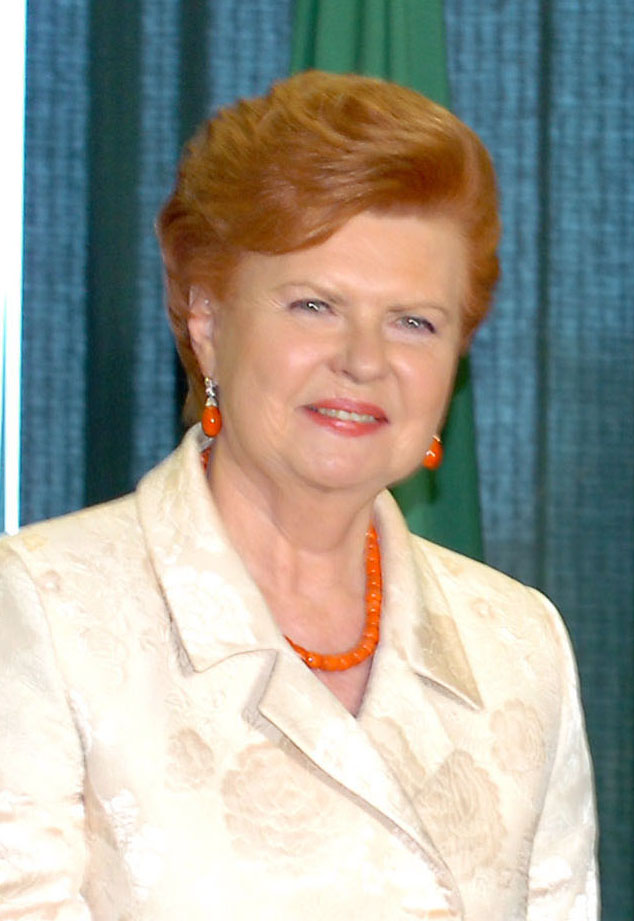 A presidenta da Letônia, Vaira Vīķe-Freiberga